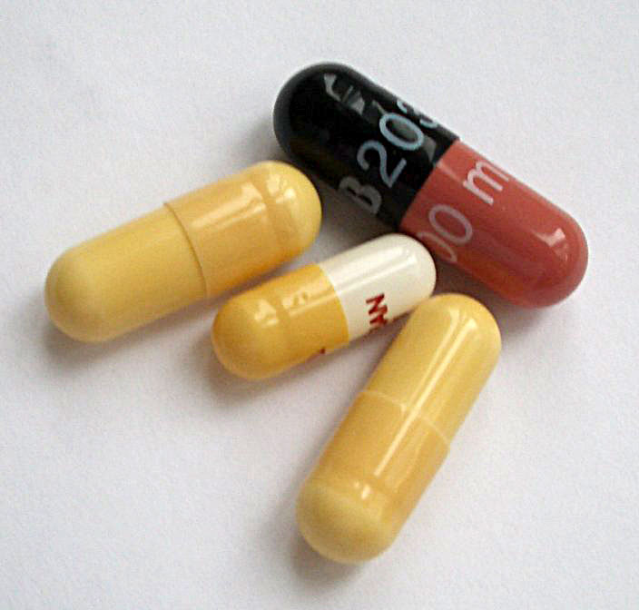 Kapseln